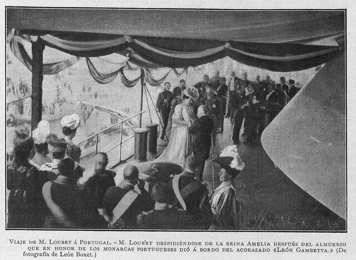 Viaje de Émile Loubet a Portugal, Loubet despidiéndose de la reina Amelia después del almuerzo en el acorazado «León Gambetta», en la revista española La Ilustración Artística.